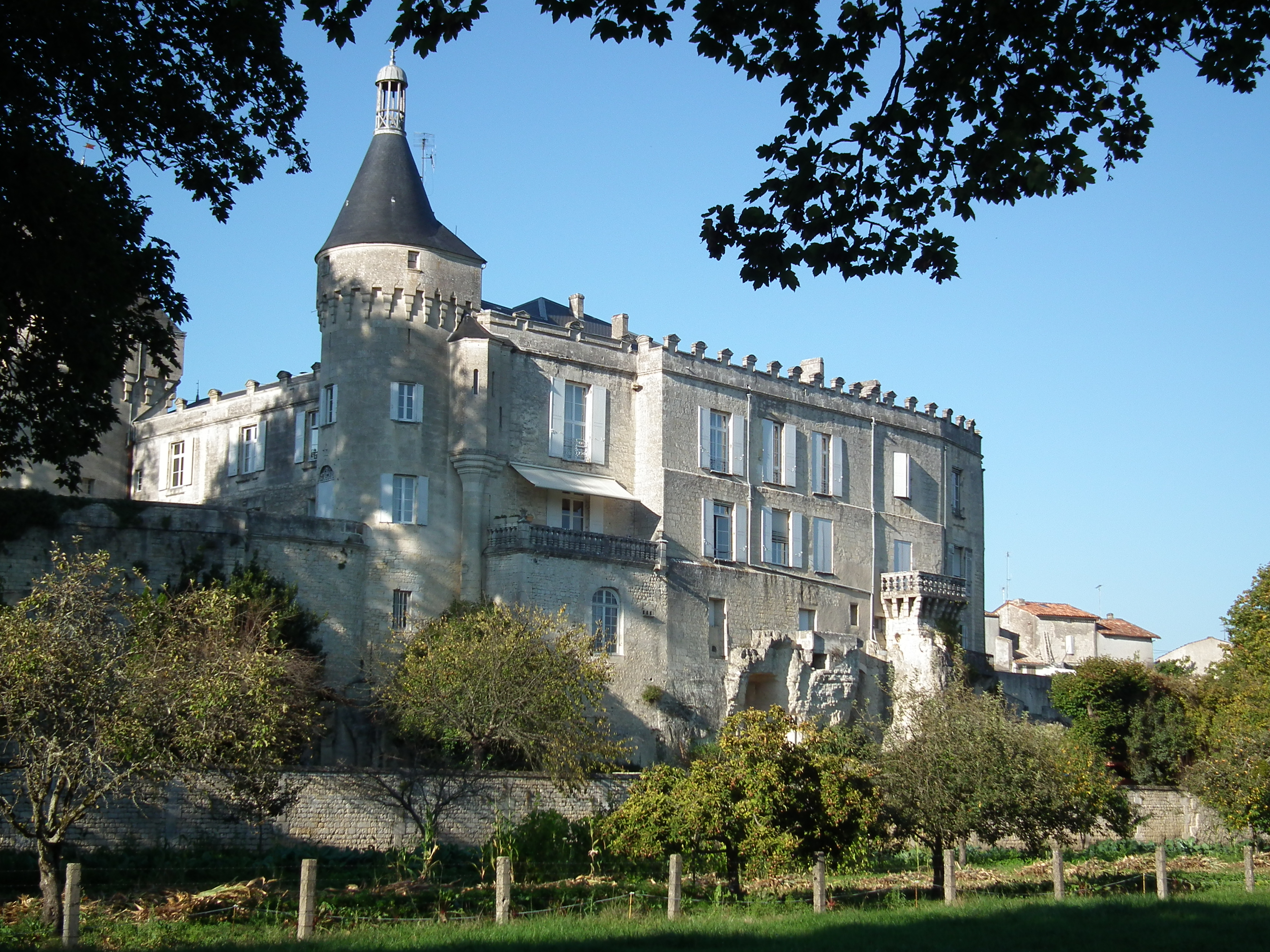 Le château de Jonzac